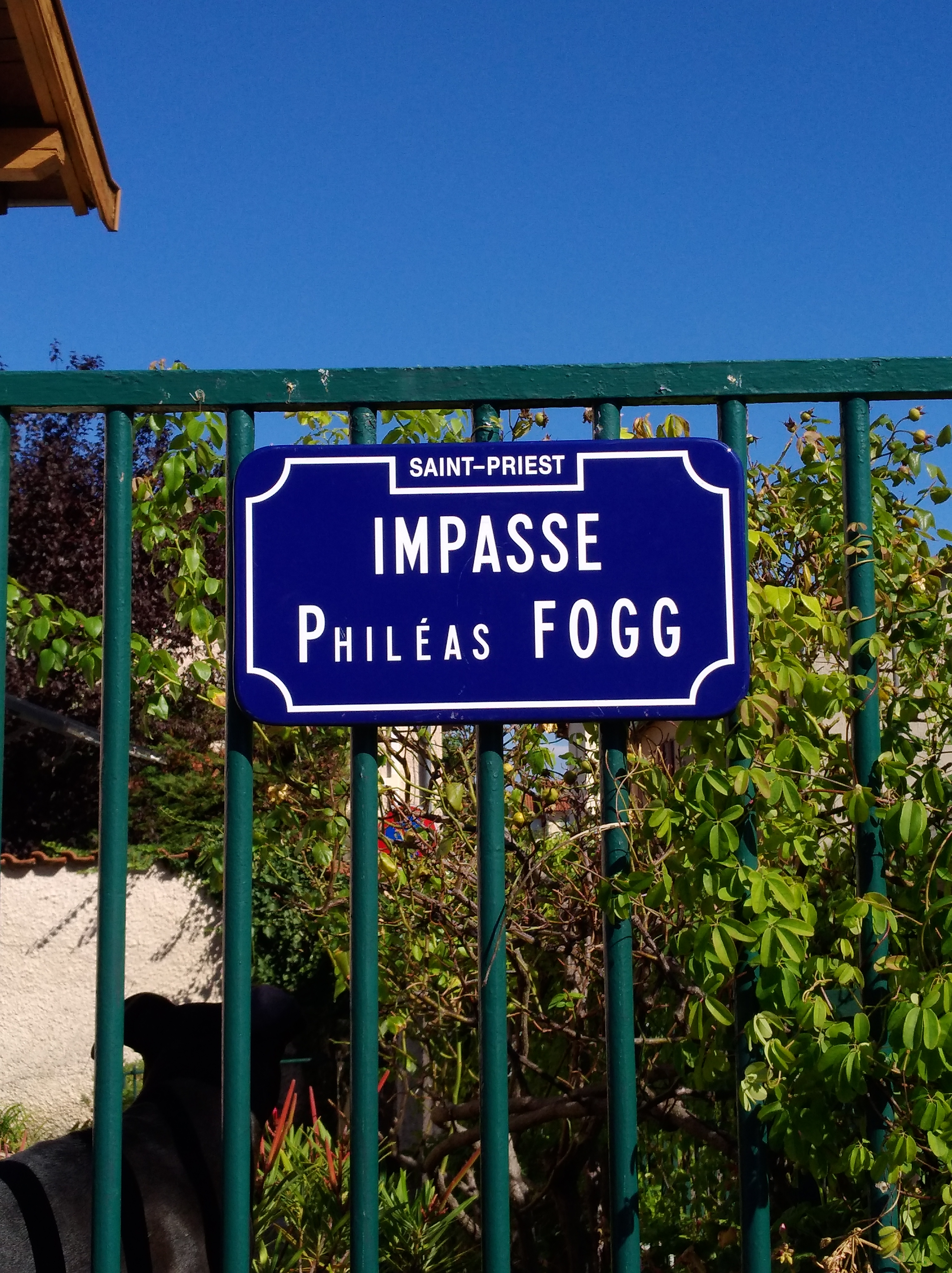 Plaque de l'impasse Philéas Fogg à Manissieux (commune de Saint-Priest, Rhône, France).